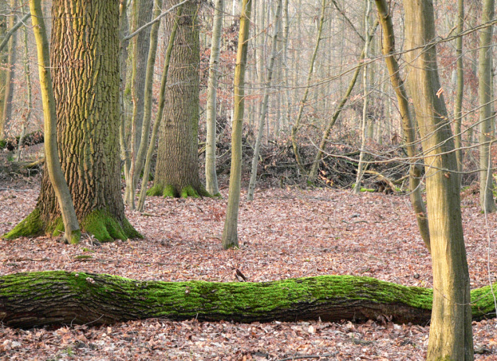 Eichen im Hämeler Wald. Foto aufgenommen von Benutzer Benutzer:AxelHH, Februar 2007